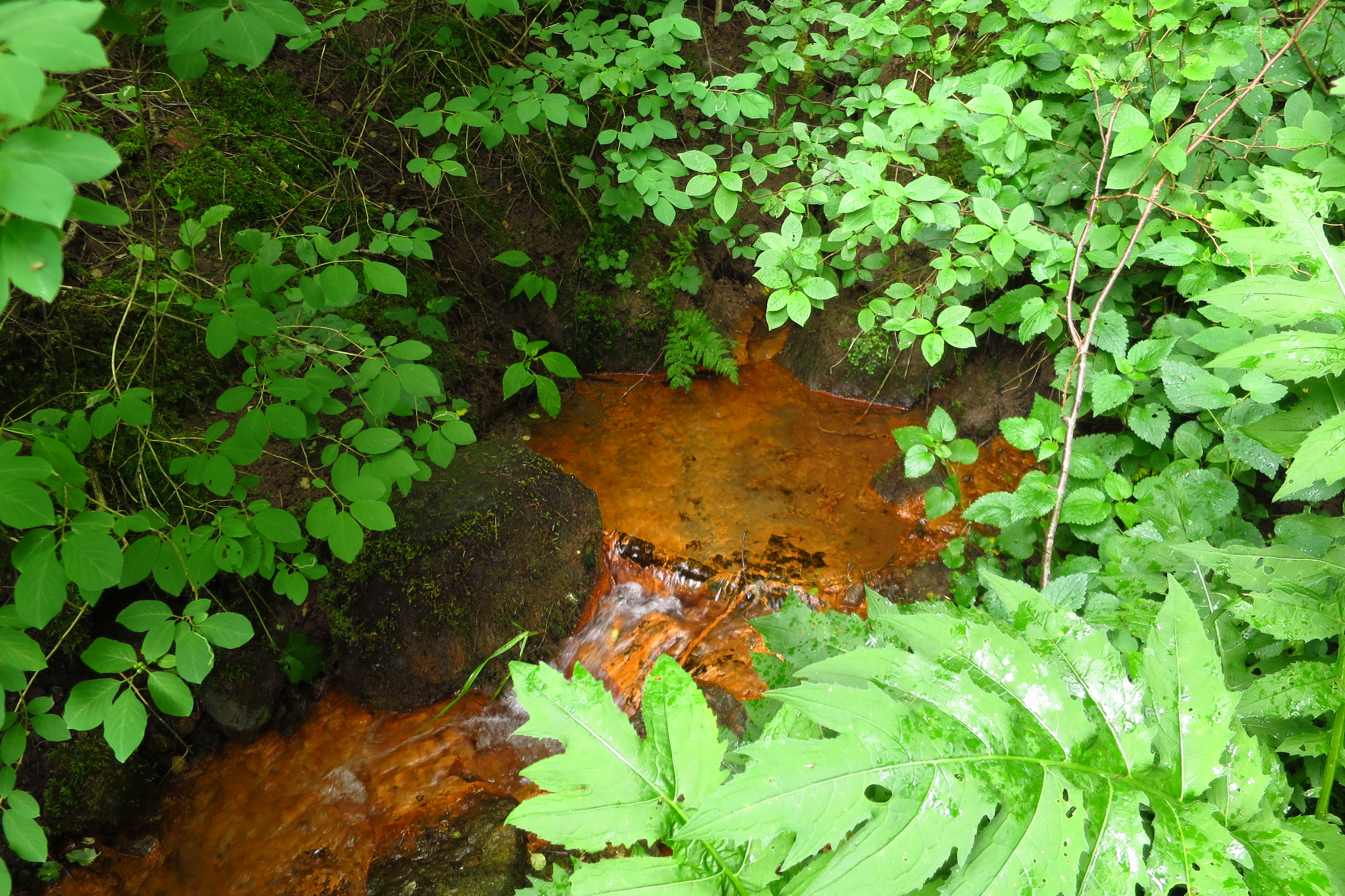 Samma Silmaallikas Padaoru maastikukaitsealal